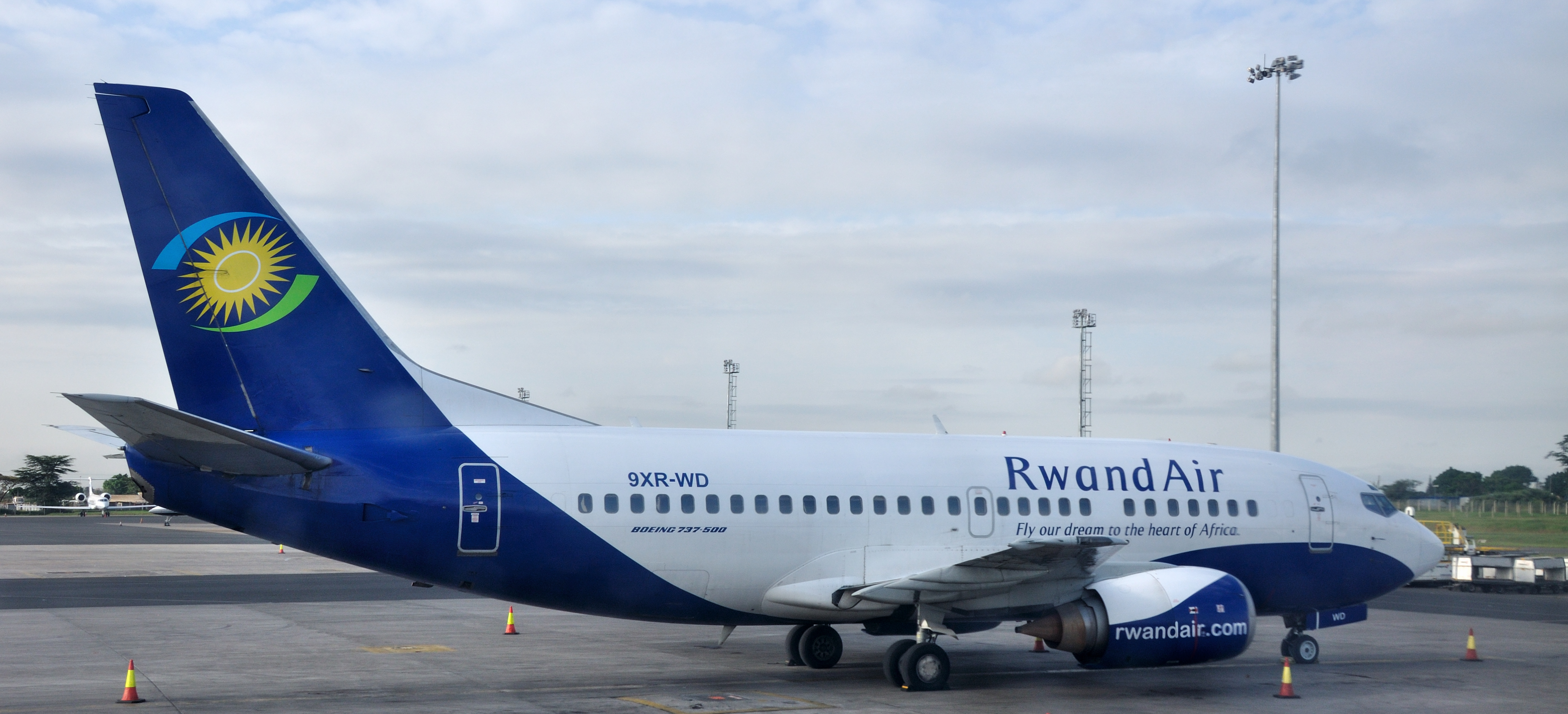 Kenya, RwandAir Boeing 737-500 9XR-WD at Jomo Kenyatta International Airport